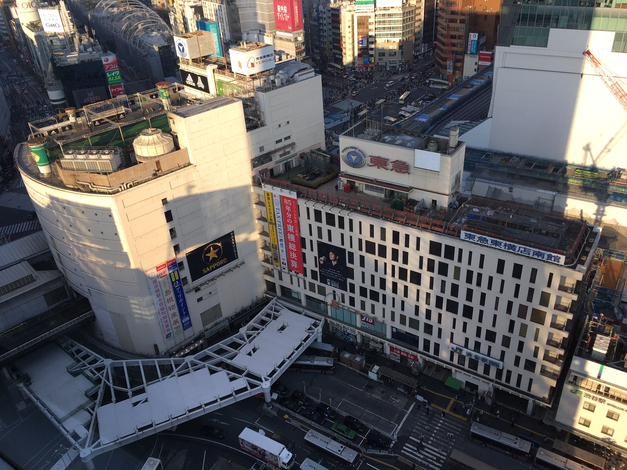 Tokyu Toyoko Department Store